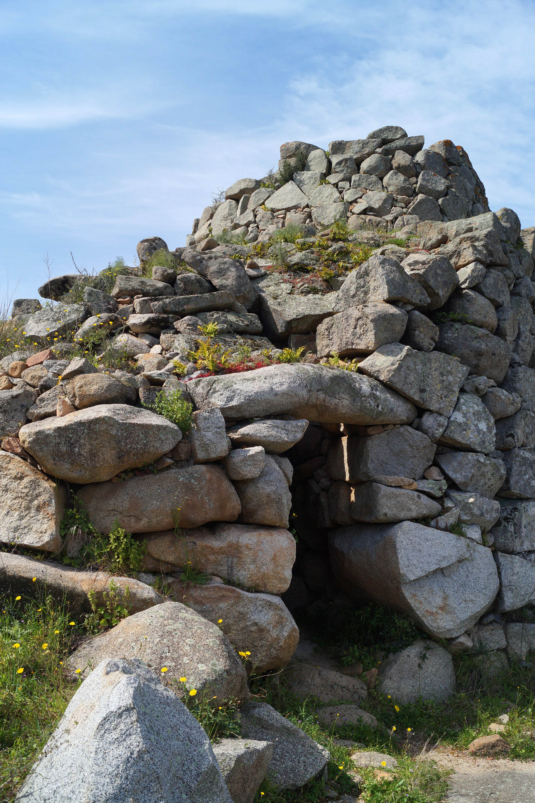 Nuraghe Scerì Ilbono This is a photo of a monument which is part of cultural heritage of Italy.